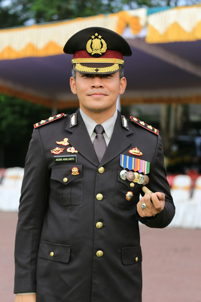 AGUNG MARLIANTO, S.I.K., M.H Nama : Agung Marlianto Tempat lahir : Kolaka Tanggal lahir : 1 Juni 1977 Agama : Islam Suku : Jawa